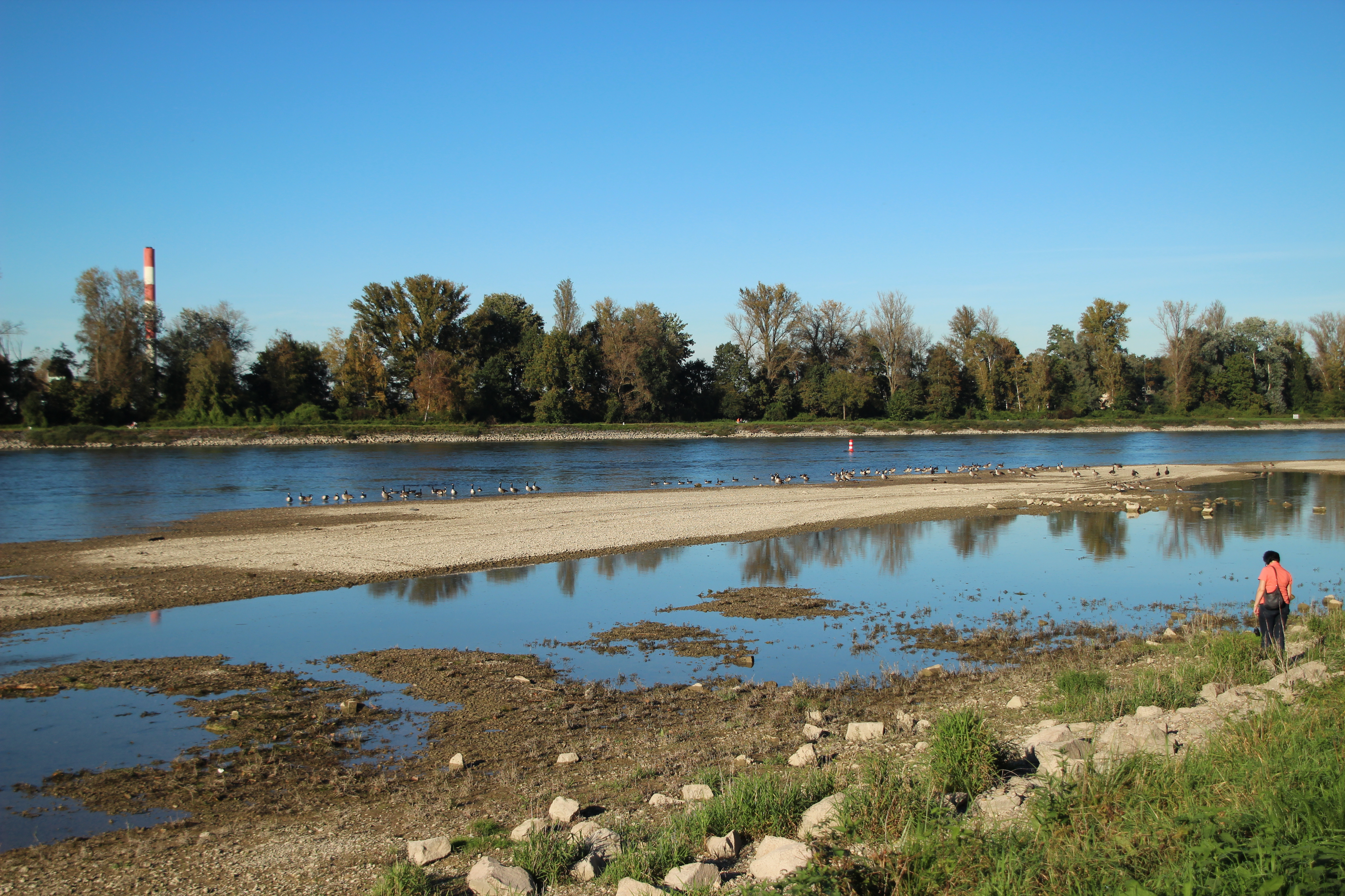 Bildinhalt: Der Rhein um die Tomateninseln, flussabwärts der Einmündung des Illinger Altrheins Aufnahmeort: Au am Rhein, Deutschland